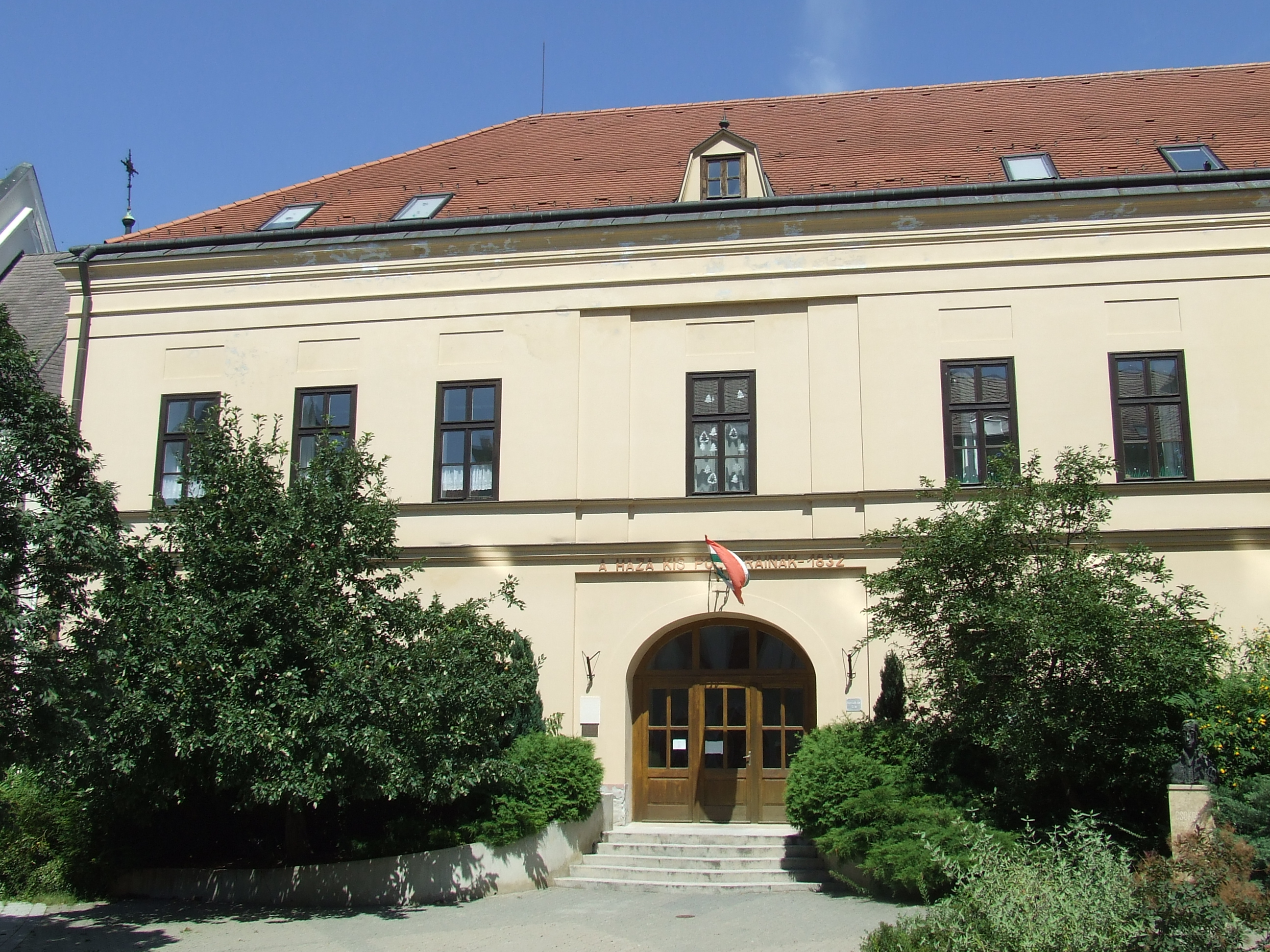 A volt polgári fiúiskola műemlék épülete a kaposvári Kossuth téren. Épült 1829 és 1832 között klasszicista stílusban. Emelete eklektikus, 19. század végi. Ma a katolikus általános iskola épületének egyik szárnya